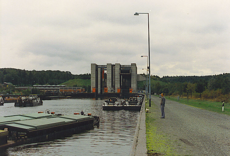 Scheepslift Scharnebeck op het Elbe-Seitenkanaal - eigen foto - september 1990